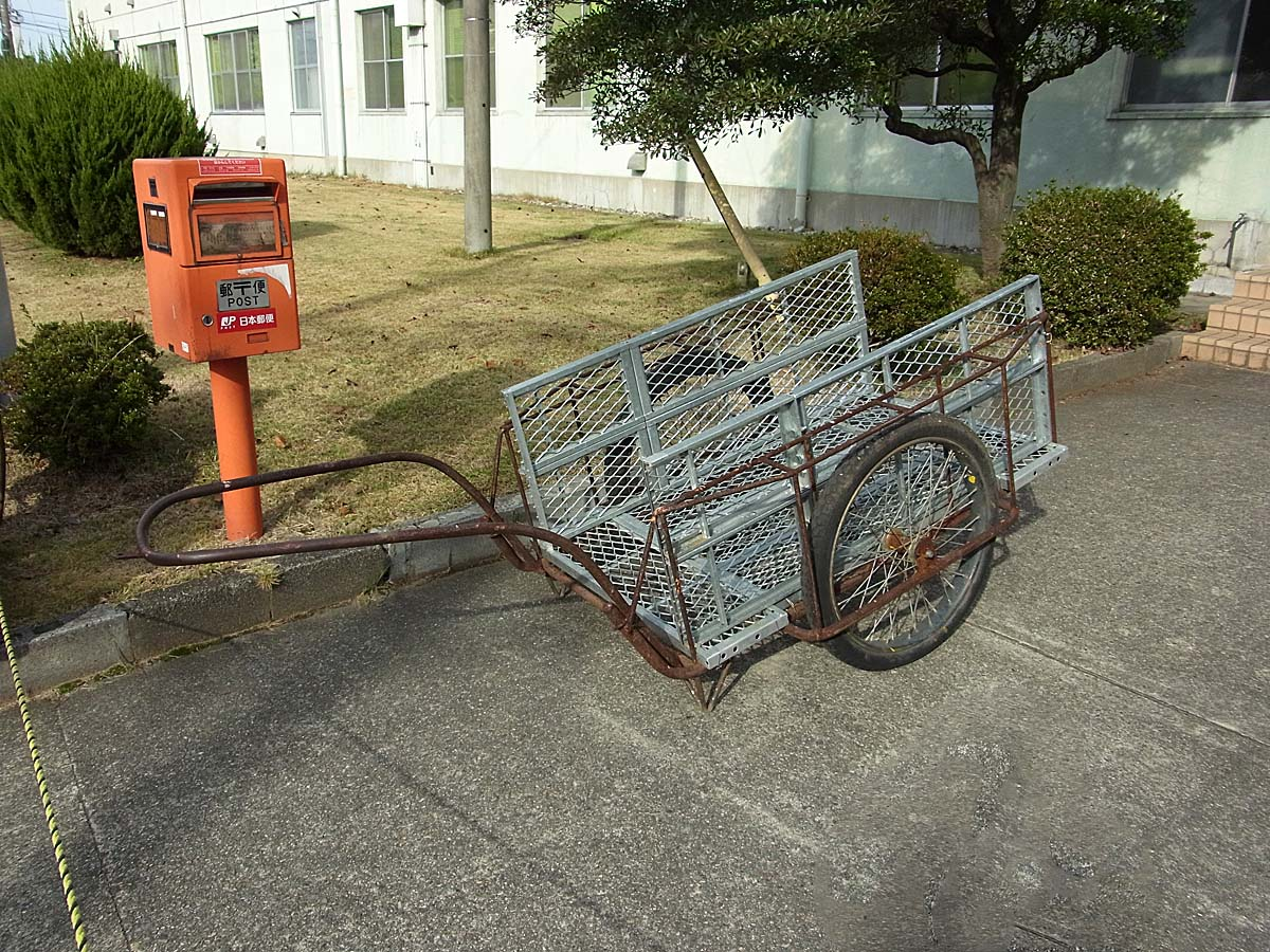 JASDF Rear car , 航空自衛隊 リヤカー